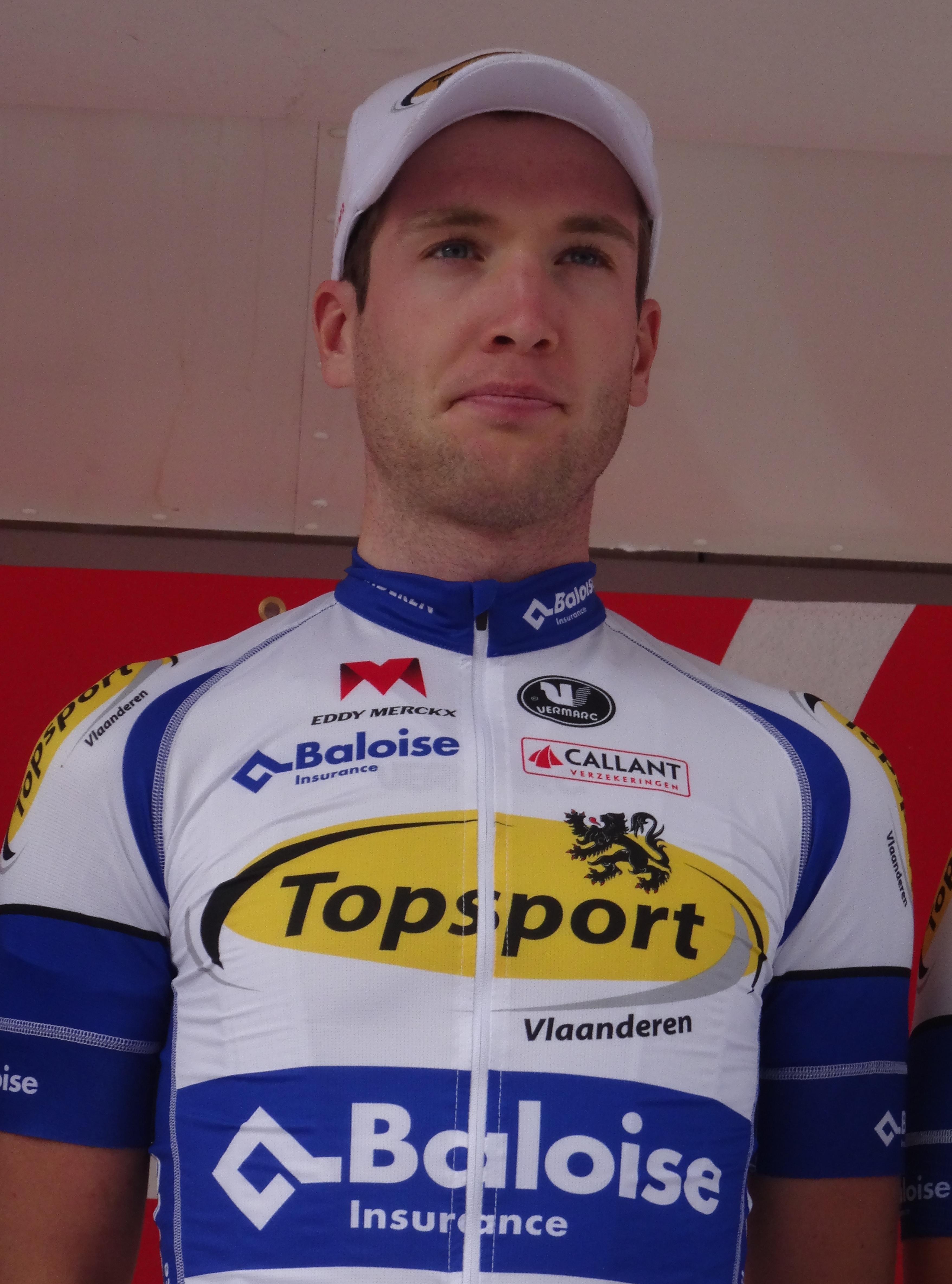 Reportage photographique réalisé le samedi 26 juillet à l'occasion du départ de la première étape du Tour de Wallonie 2014 à Frasnes-lez-Anvaing, Belgique.